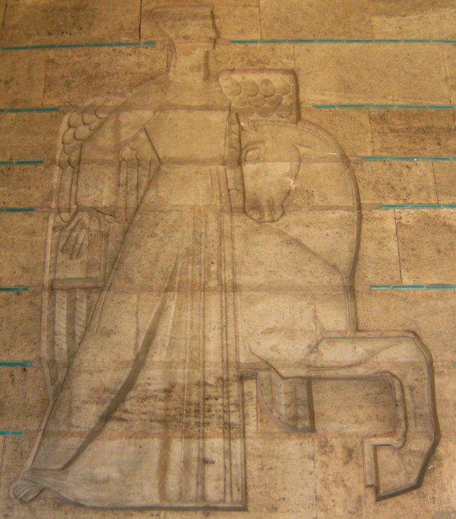 Anıtkabir rölyefi